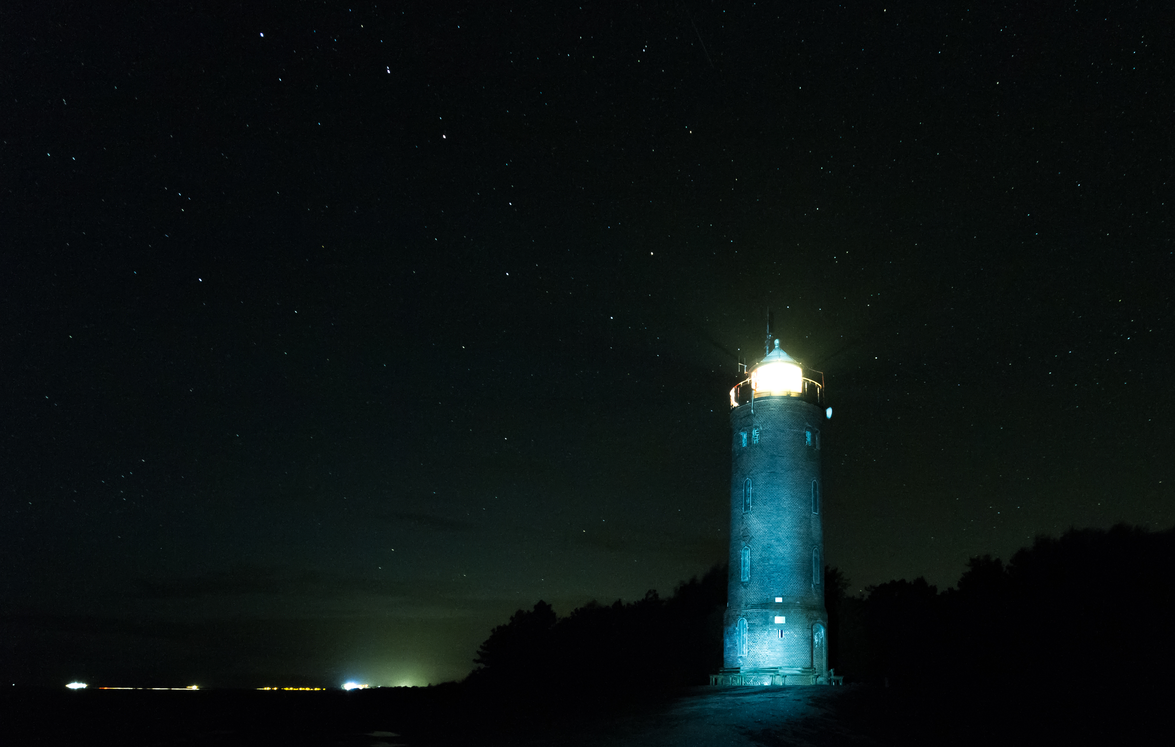 Der Leuchtturm Sankt Peter-Böhl bei Nacht